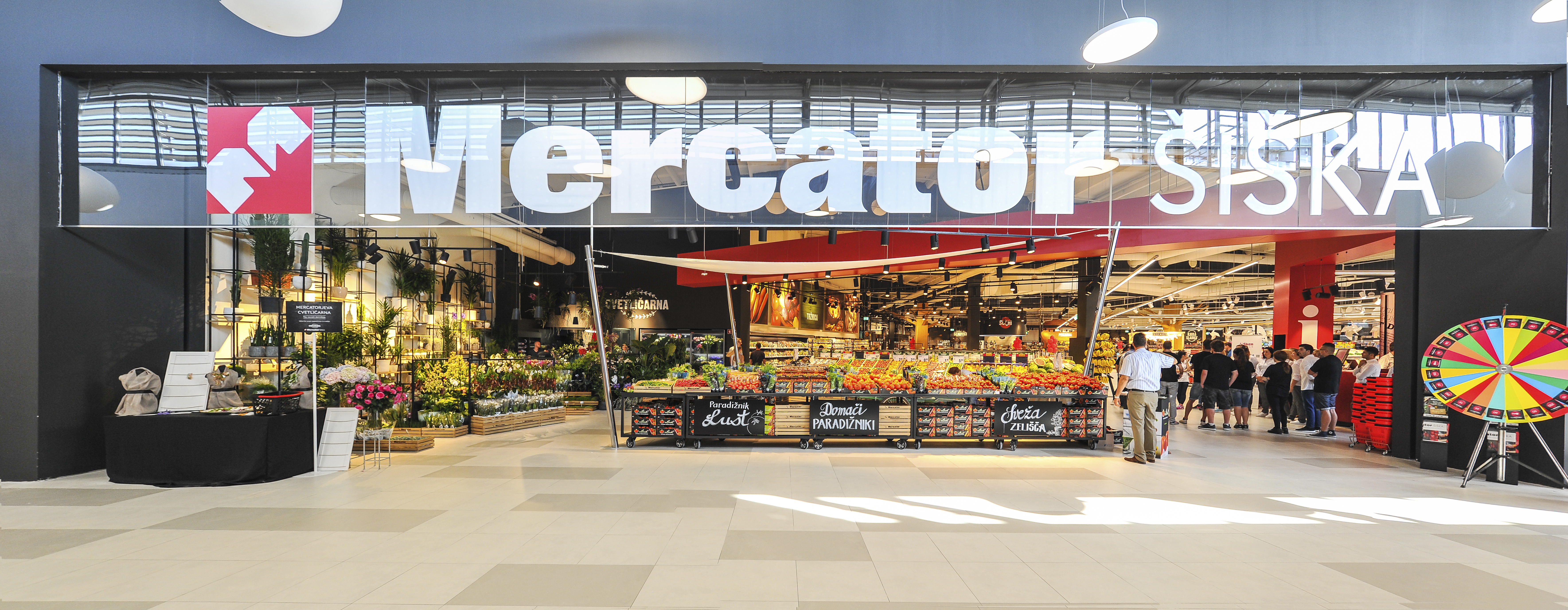 Ena izmed 115 trgovin na svetu, ki jo je vredno obiskati.